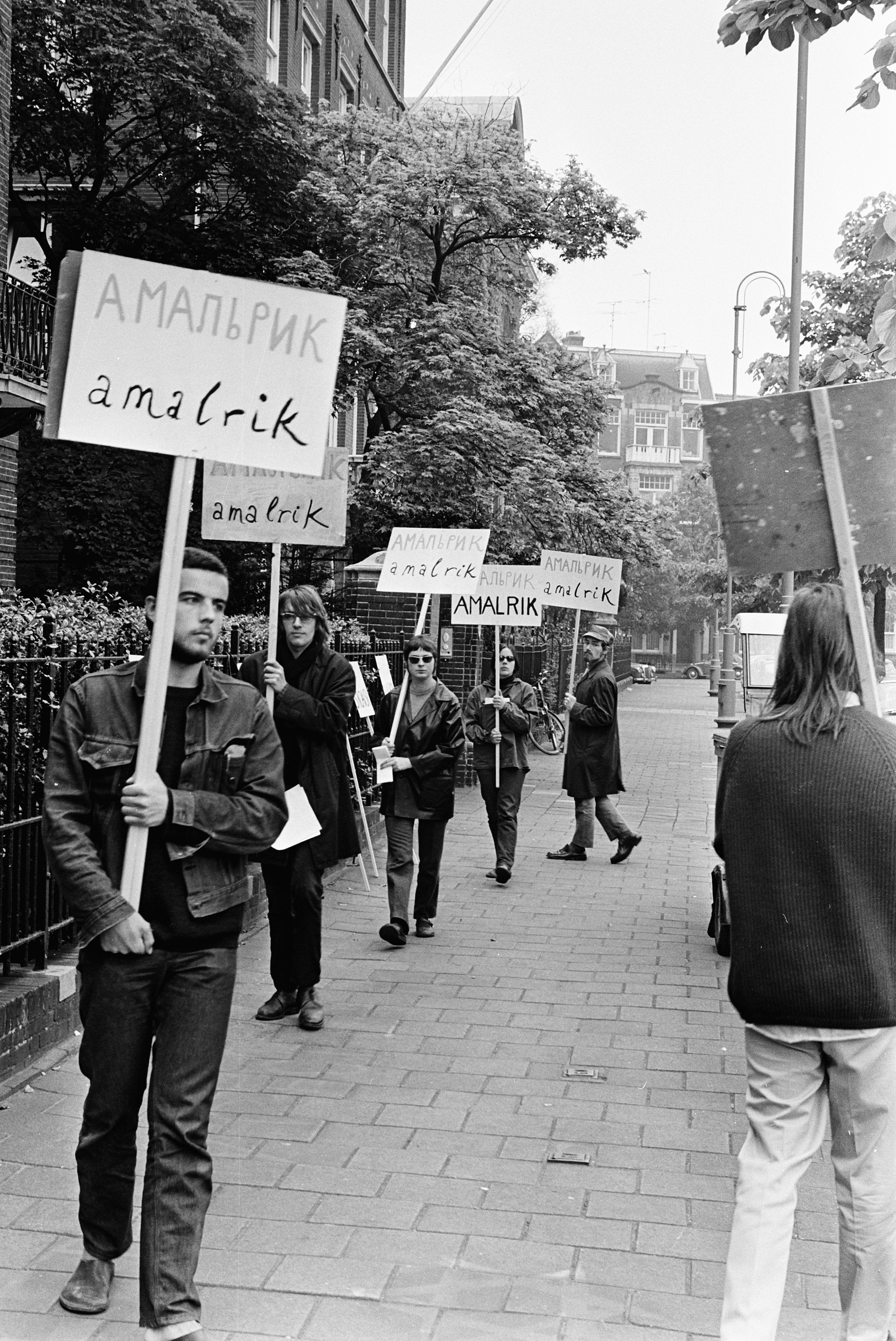 Collectie / Archief : Fotocollectie Anefo Reportage / Serie : [ onbekend ] Beschrijving : Jongeren demonstreren met borden tegen arrestatie van schrijver A. Amabrik voor gebouw Russische Handelsvertegenwoordiging , Amsterdam / Datum : 29 mei 1970 Locatie : Amsterdam, Noord-Holland Trefwoorden : JONGEREN, arrestaties, demonstraties, gebouwen Persoonsnaam : A. Amabrik Fotograaf : Croes, Rob C. / Anefo Auteursrechthebbende : Nationaal Archief Materiaalsoort : Negatief (zwart/wit) Nummer archiefinventaris : bekijk toegang 2.24.01.05 Bestanddeelnummer : 923-5571